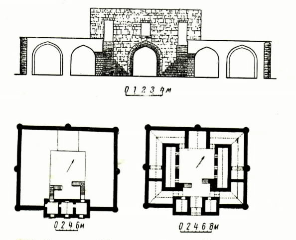 Səngəçal karvansarasının planı və kəsiyi